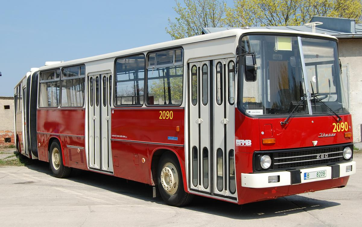 Česky: Ikarus v Brně v muzeu.